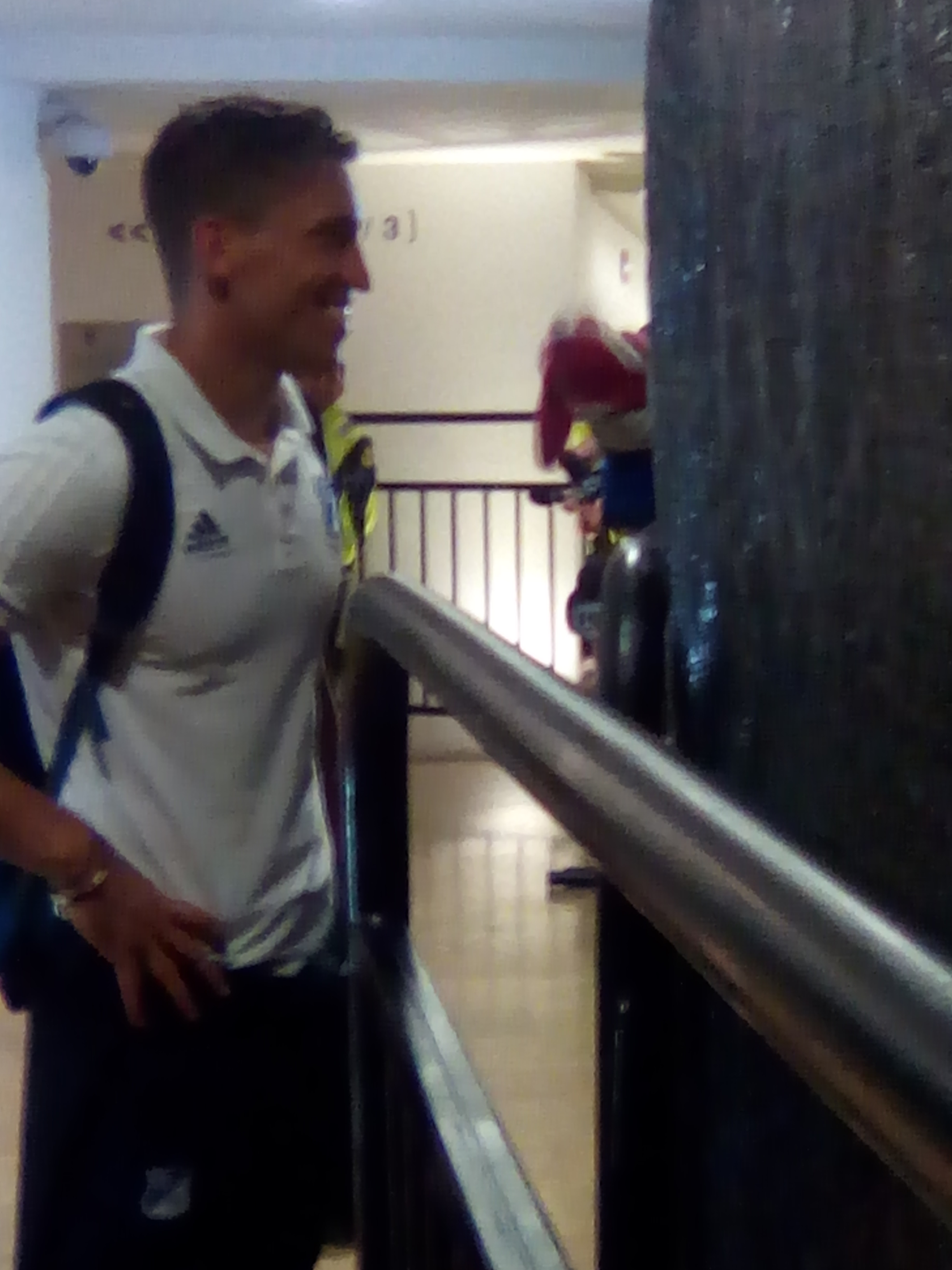 Nicolás Vikonis con Millonarios.